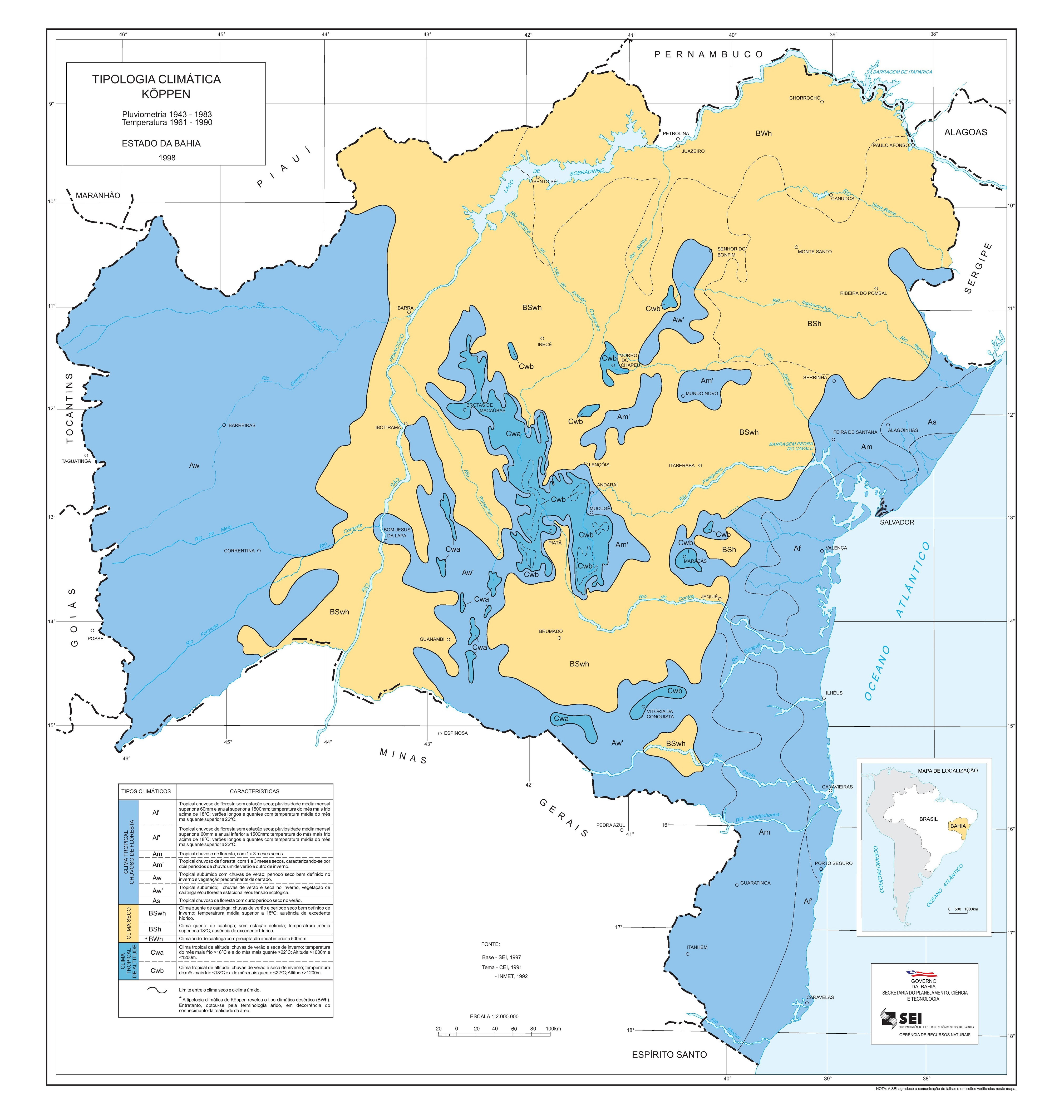 Köppen-Geiger Classification to the Brazilian State of Bahia